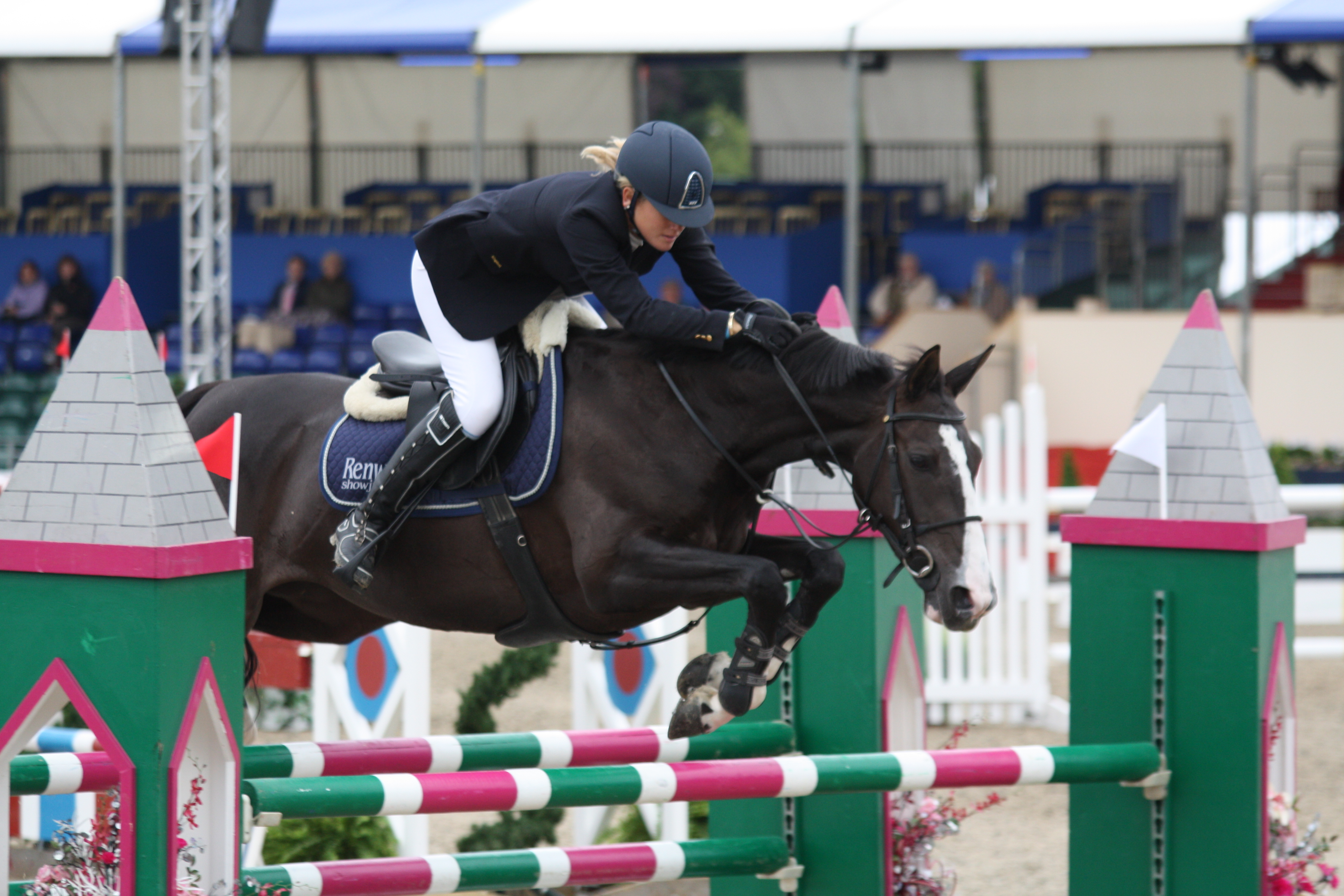 Laura Renwick riding Limelight De Breve